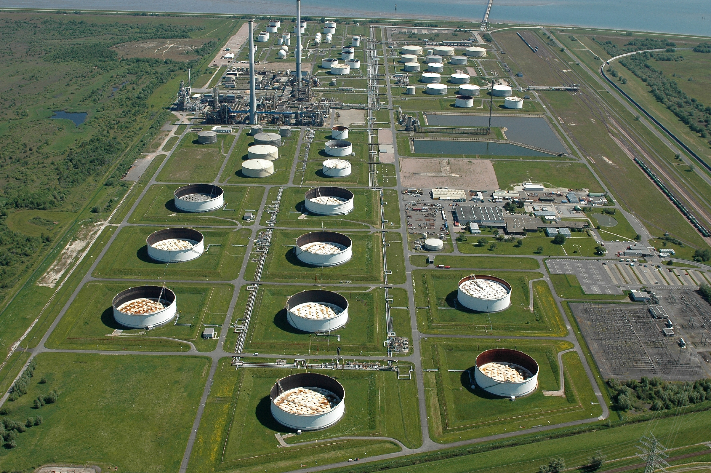 Fotoflug vom Flugplatz Nordholz-Spieka über Cuxhaven und Wilhelmshaven